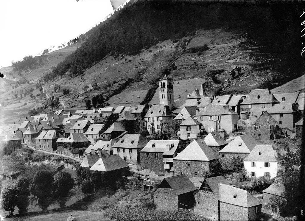 Imatge